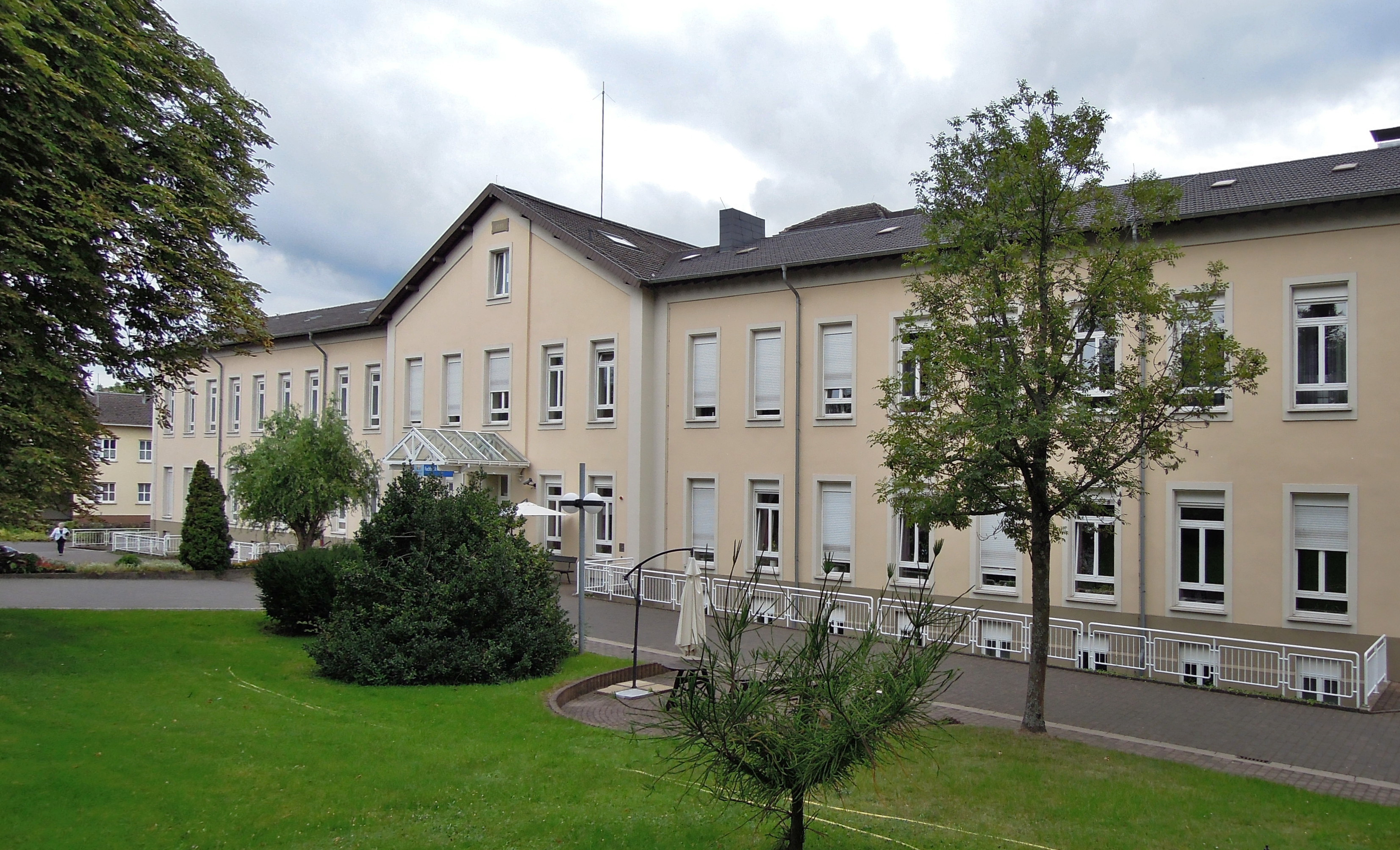 Hospitalstraße 5, St. Nikolaus-Hospital mit Hospitalkapelle, 1883-85 (Einzeldenkmal)